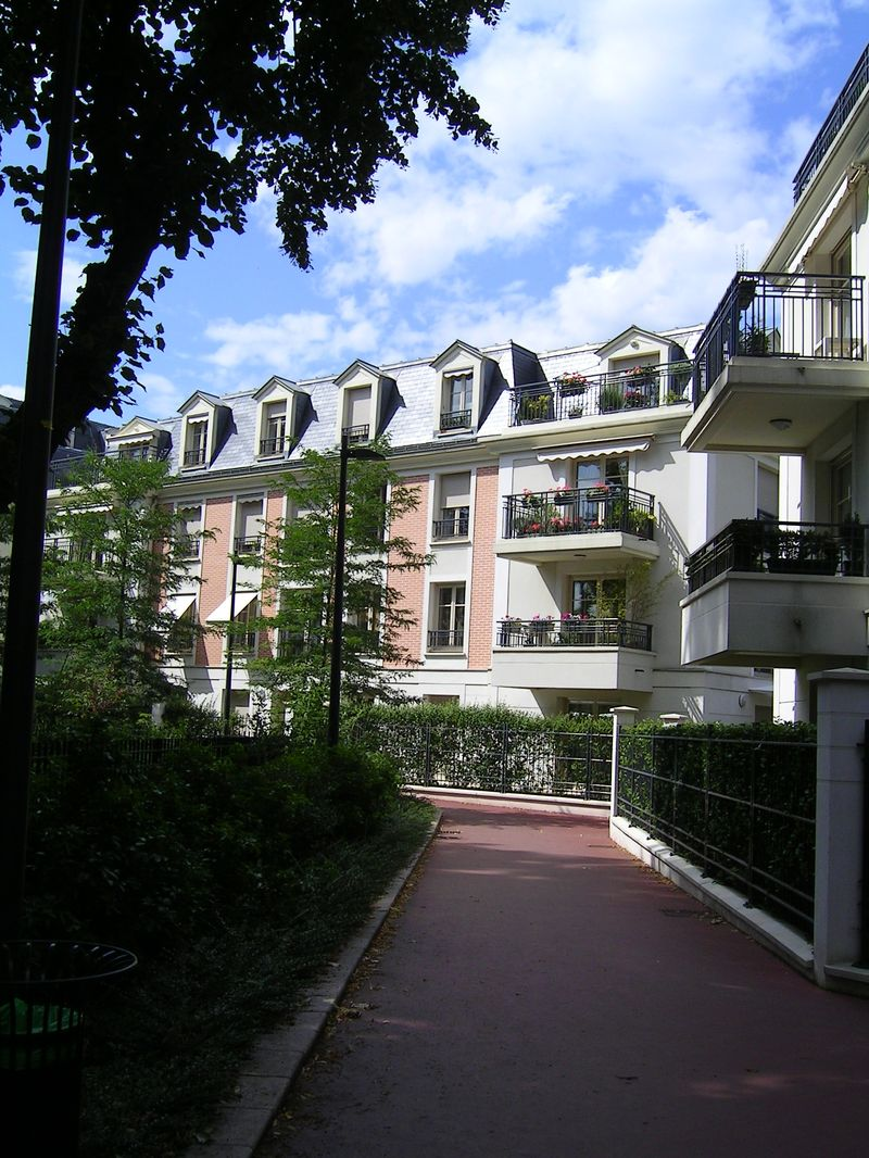 Immeubles modernes en centre-ville Photo personnelle (own work) de Marianna